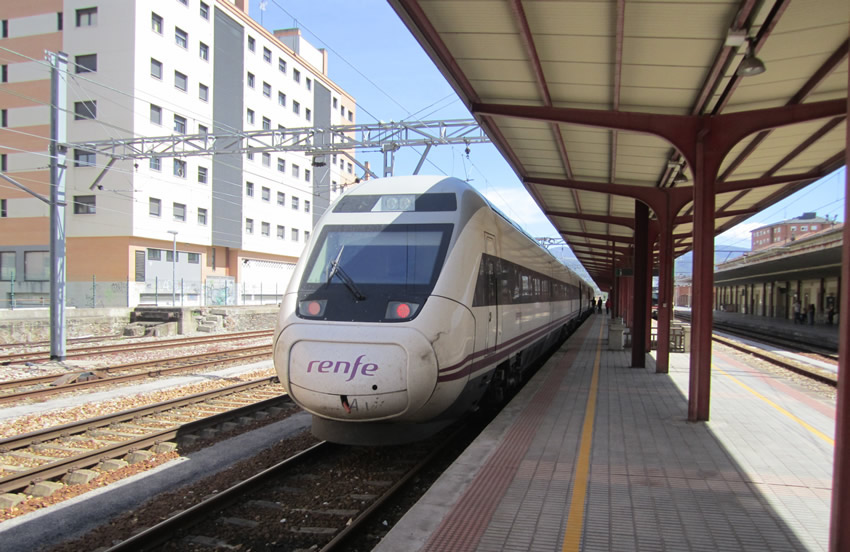 Un automotor eléctrico de la serie 120 de Renfe Operadora espera, estacionado en la estación de Ponferrada (El Bierzo, Provincia de León, Castilla y León), para realizar el servicio Intercity a Madrid Chamartín.